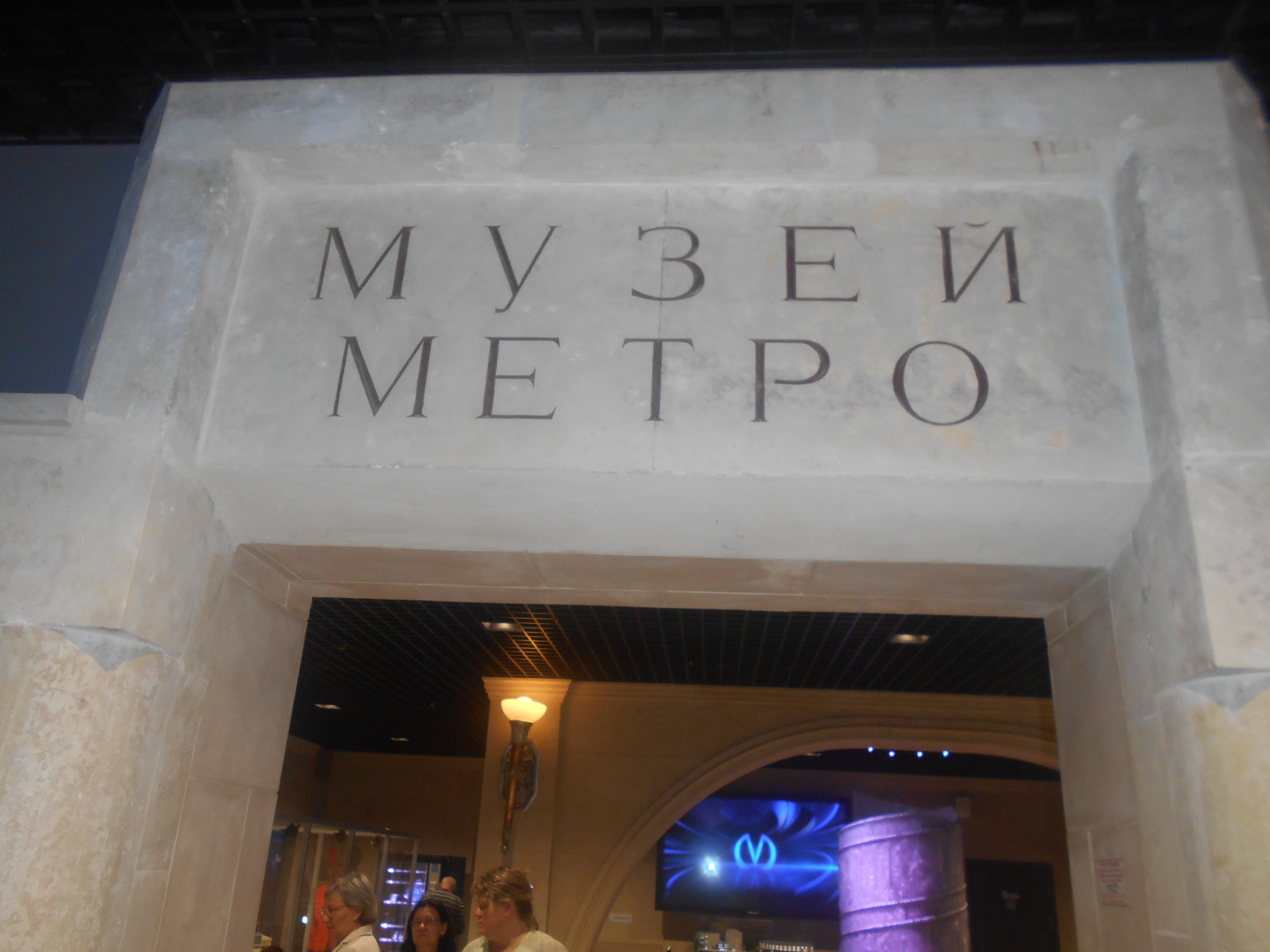 Музей